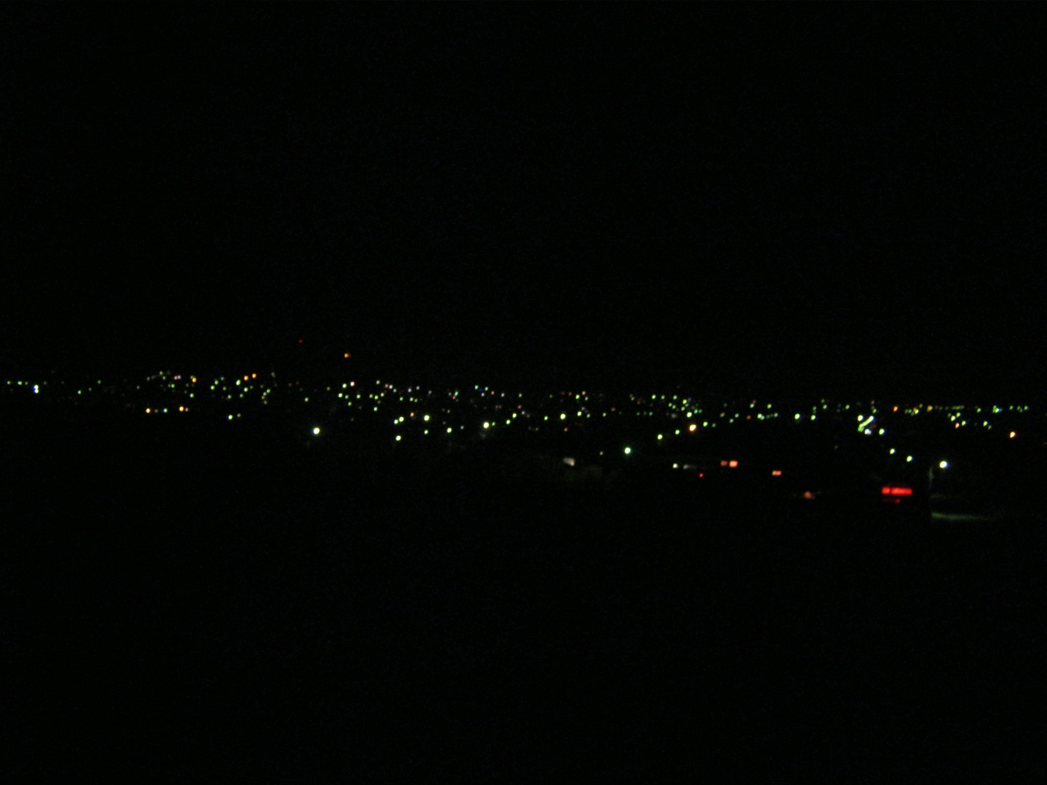 Светлоград вид ночью